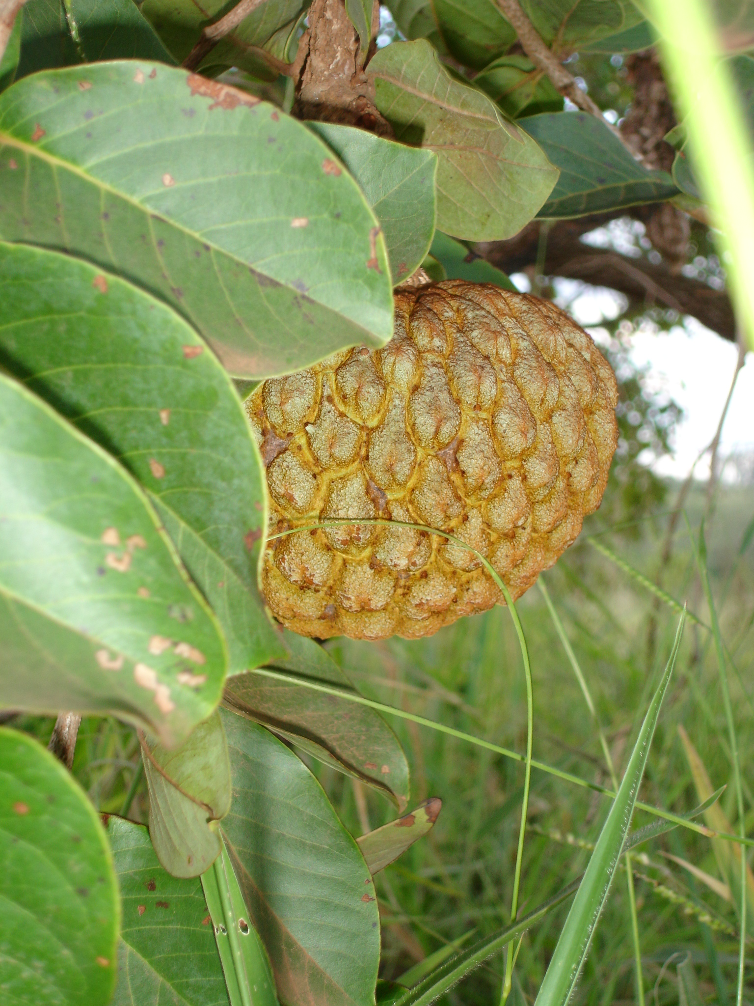 Fruto de araticum (Anonna crassiflora).